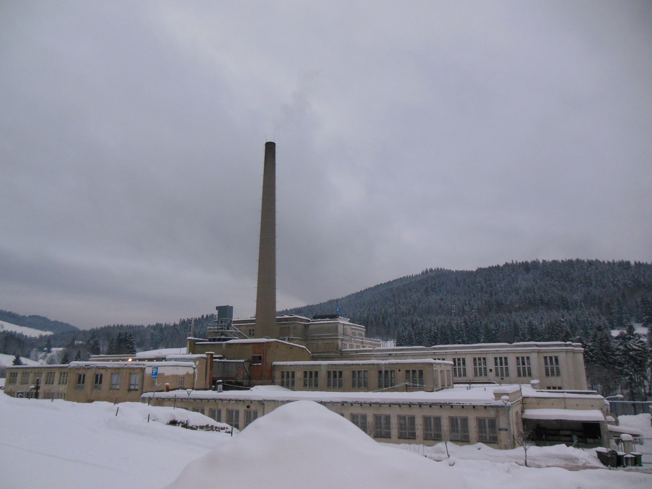 Továrna na výrobu hraček v Jiřetíně pod Bukovou (okres Jablonec nad Nisou).